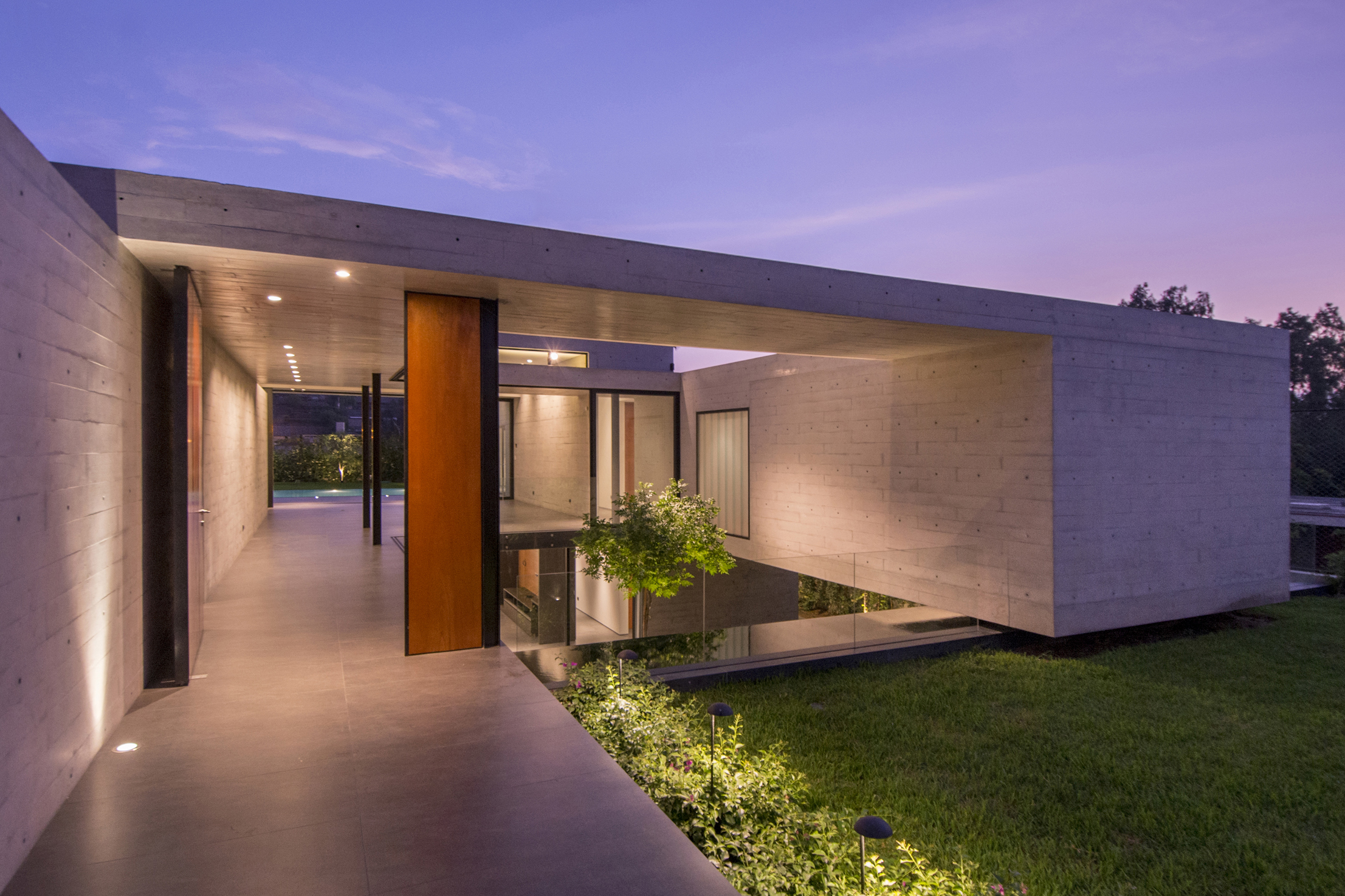 Ingreso, Alfredo Benavides y Cynthia Watmough.